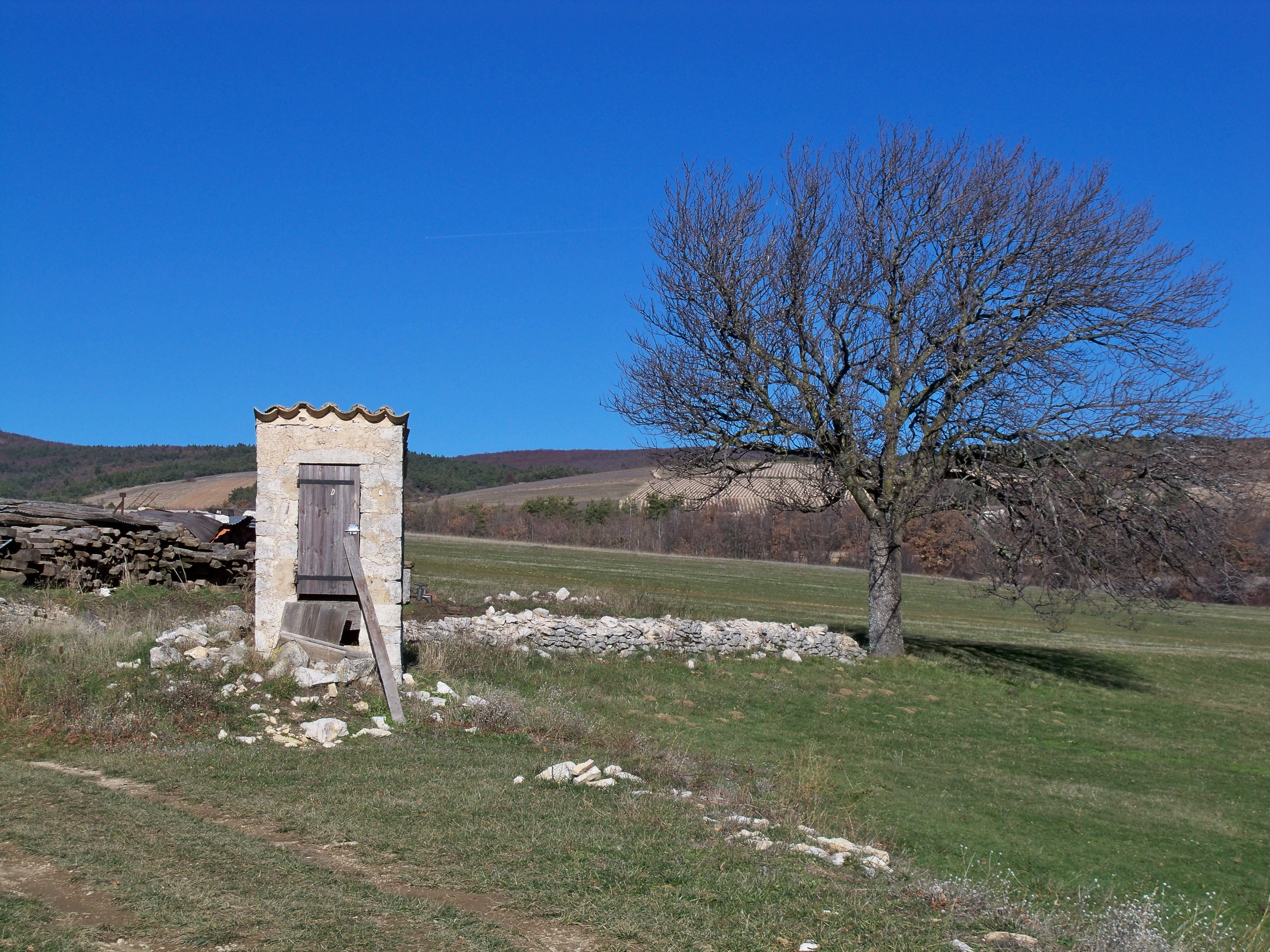 puits couvert Chateau de la Gabelle (Ferrassières)